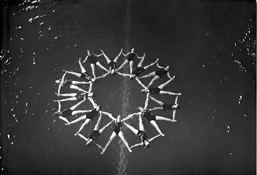 Figurenschwimmen des Berliner Damenschwimmklubs "Nixe" im Wellenbad im Lunapark in Berlin ! Blick auf eine gut gelungene Figur des Damenschwimmklubs "Nixe".